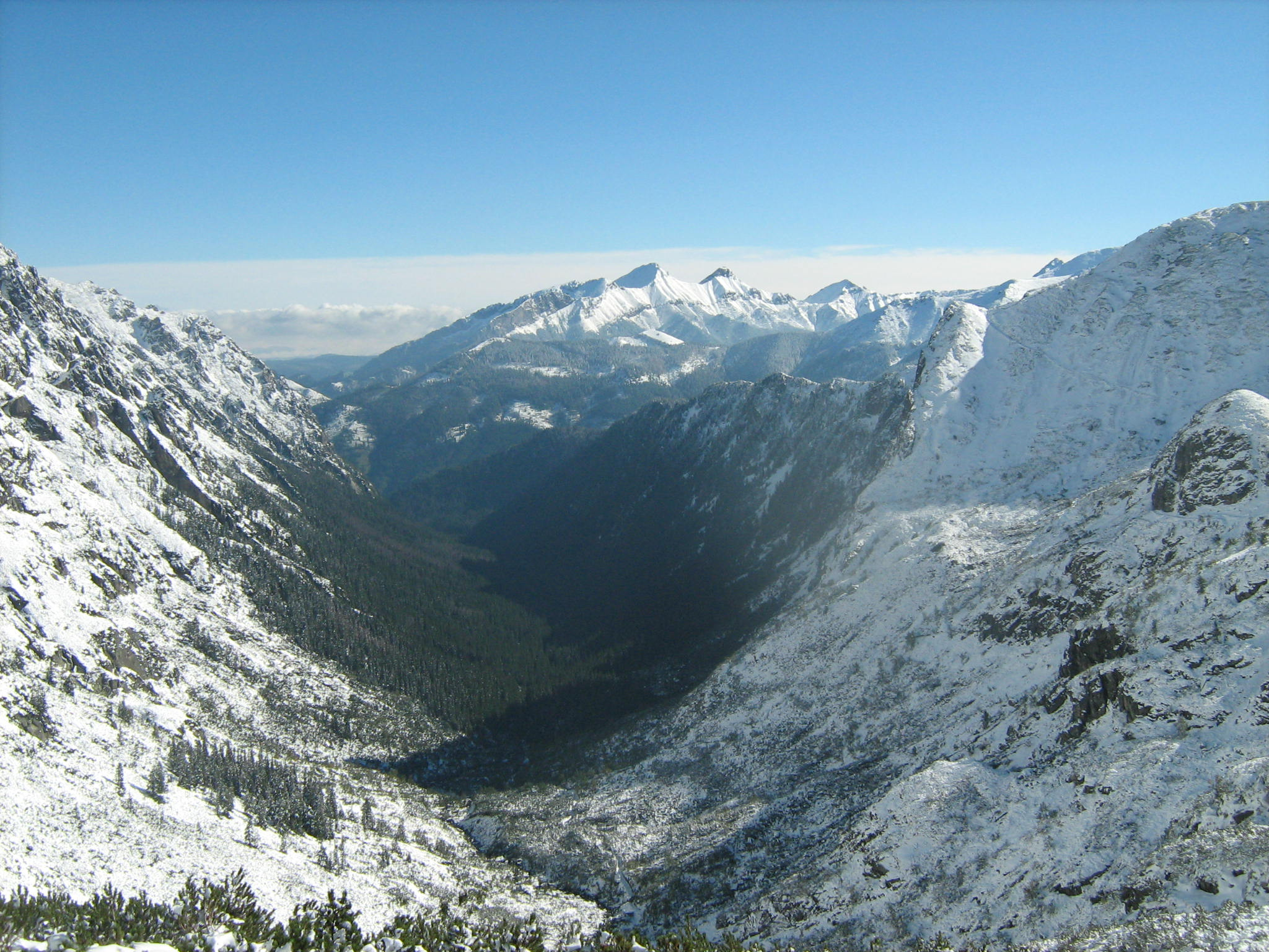 Widok na zaśnieżoną Dolinę Roztoki ze szlaku na przełęcz Krzyżne.